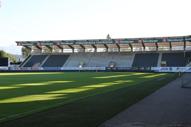 Schabelholz Altach